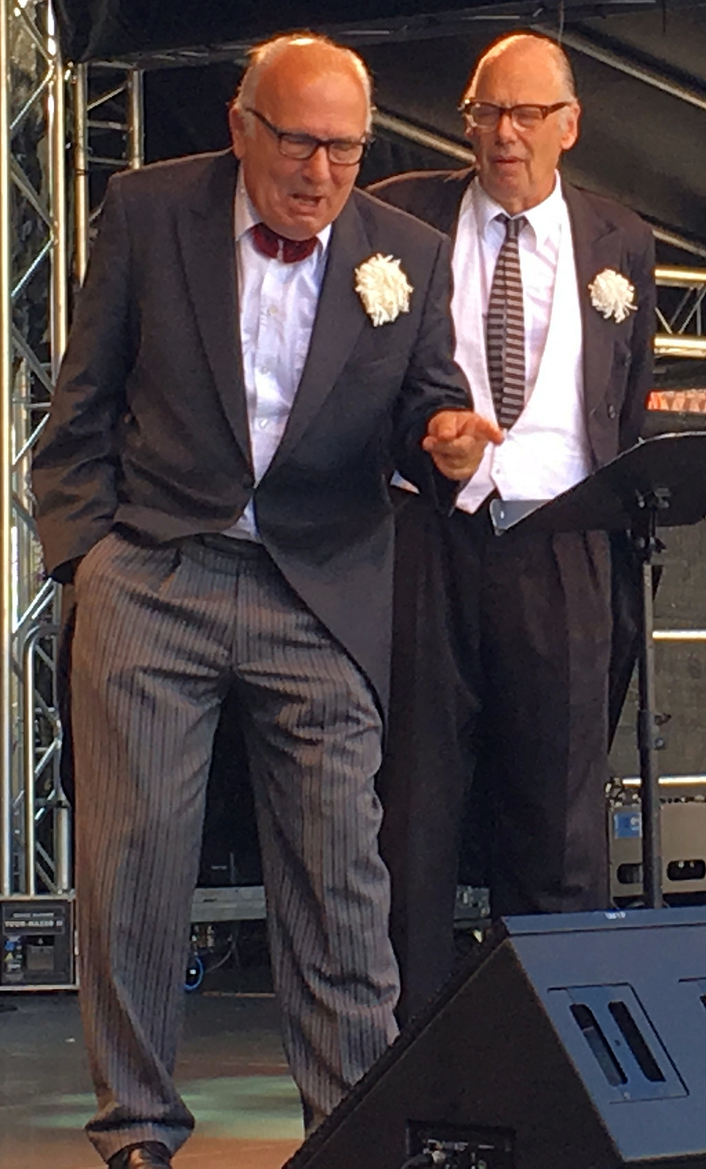 Deutschland, Bonn-Beuel, Bürgerfest; Bühne auf dem Rathausplatz: Norbert Alich (links) als Hermann Schwaderlappen und Rainer Pause (rechts) als Fritz Litzmann.